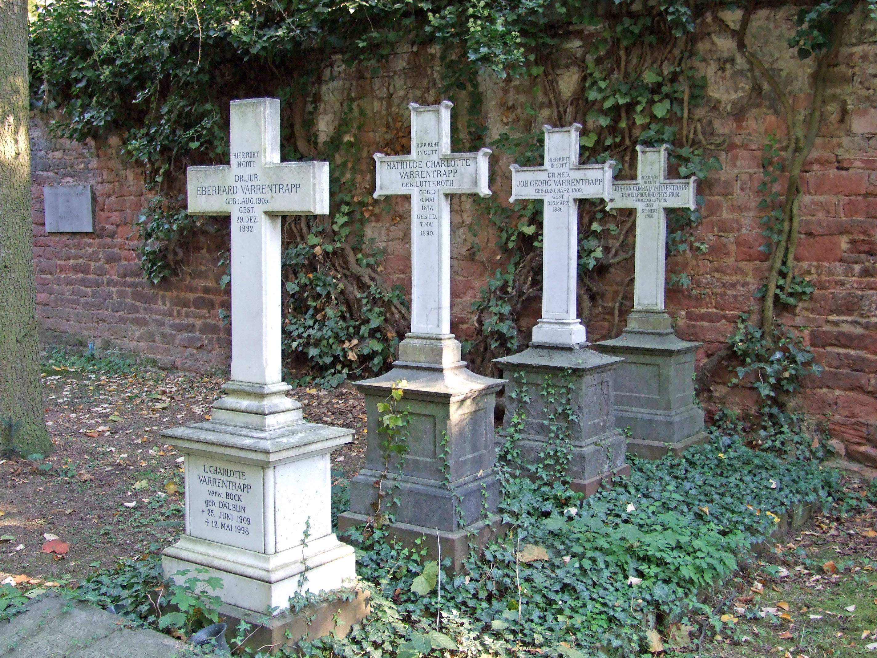 Varrentrapp Grabstelle auf dem Hauptfriedhof in Ffm